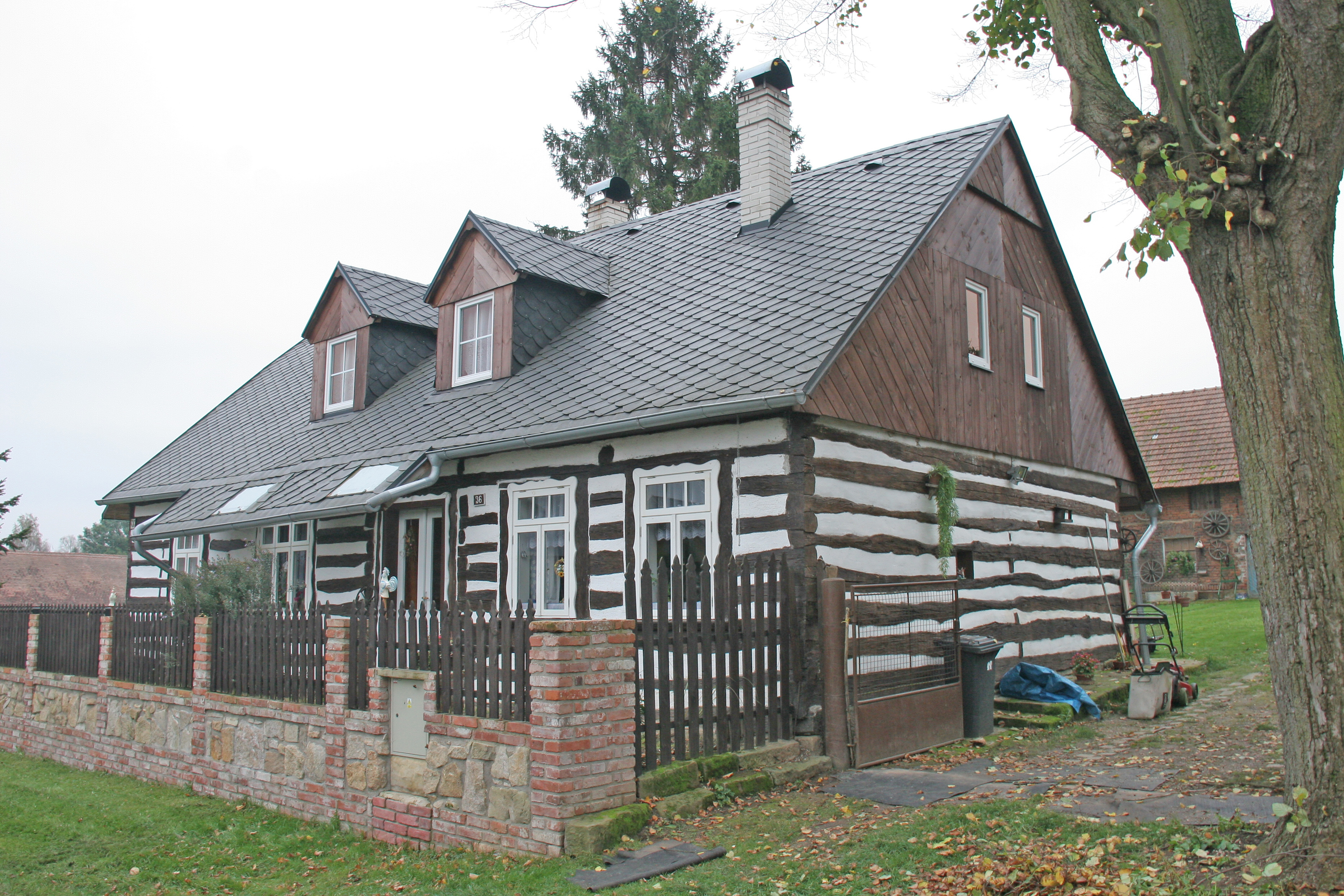 Labouň 36